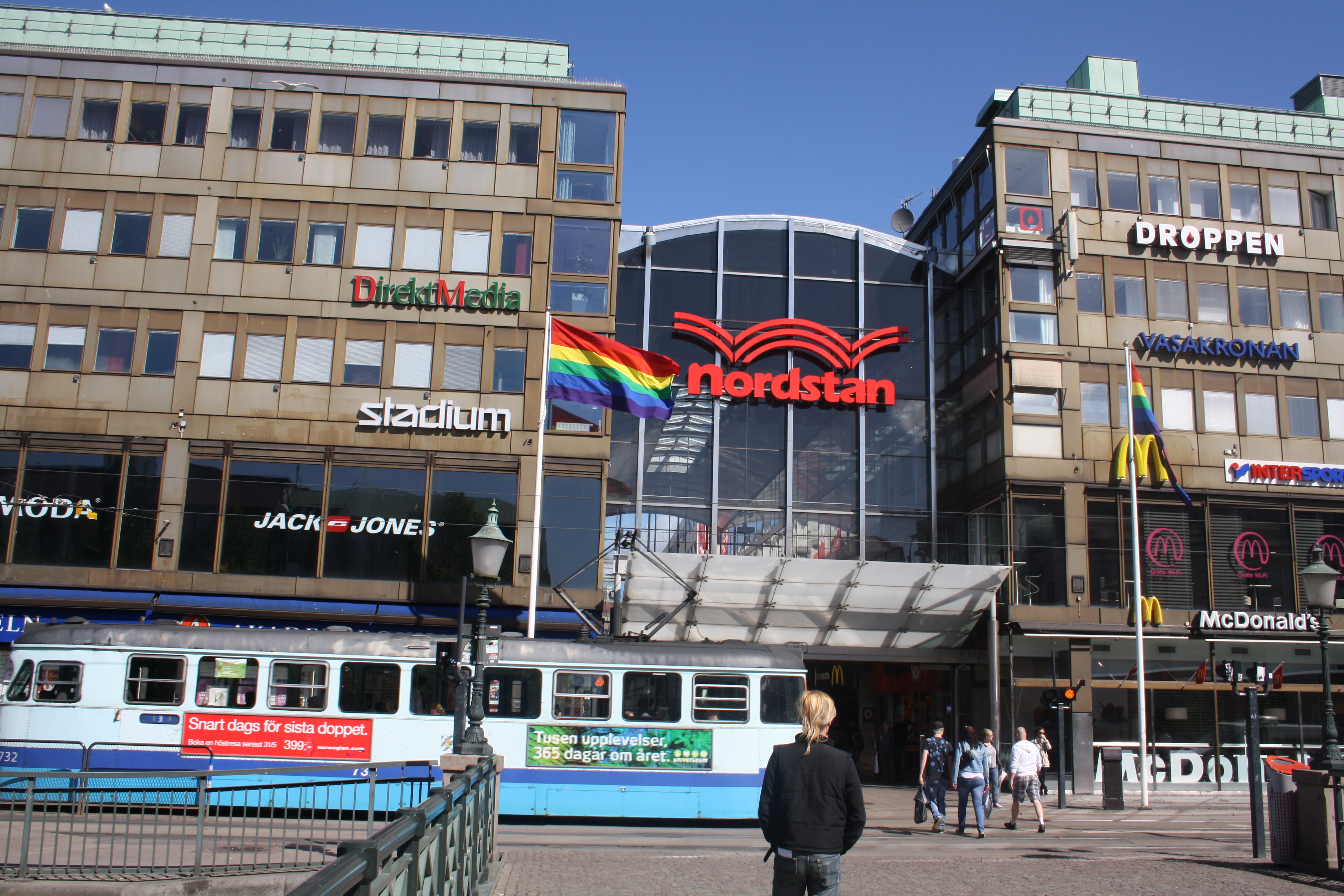 Trams in Gothenburg, Sweden